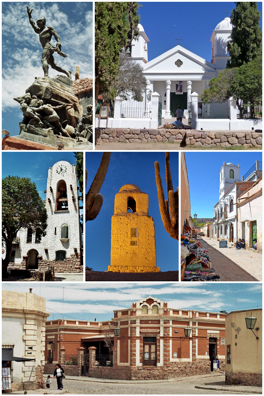 Mosaico fotográfico de la ciudad de Humahuaca.